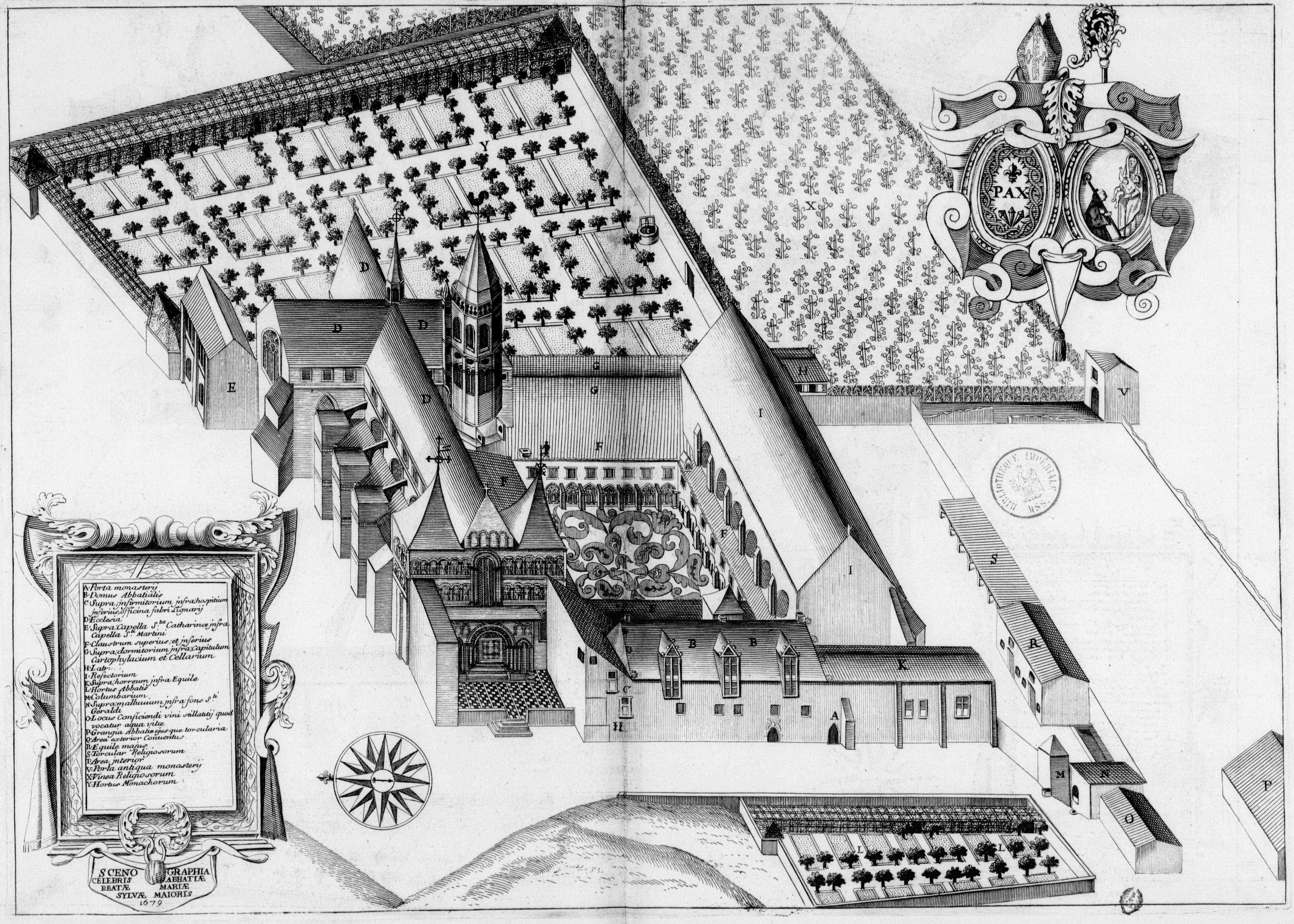 Planche gravée du 17ème siècle représentant l'abbaye de La Sauve-Majeure, en France, dans le livre Monasticon Gallicanum.